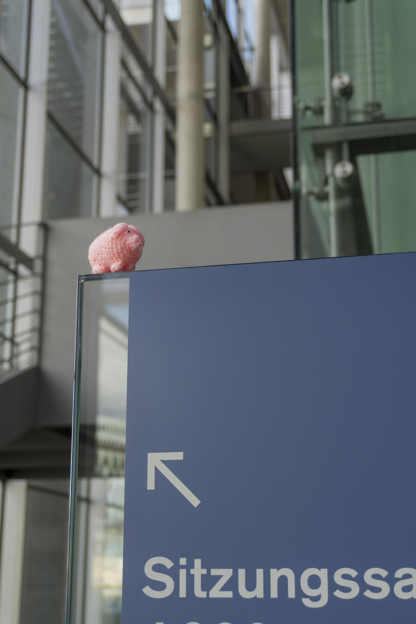 Das Häkelschwein auf einer gläsernen Informationstafel im Paul-Löbe-Haus des Deutschen Bundestages.